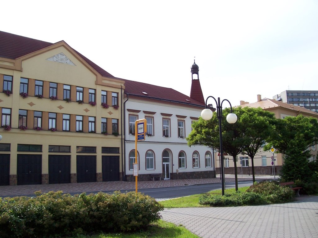 Radniční náměstí v Mariánských Horách.